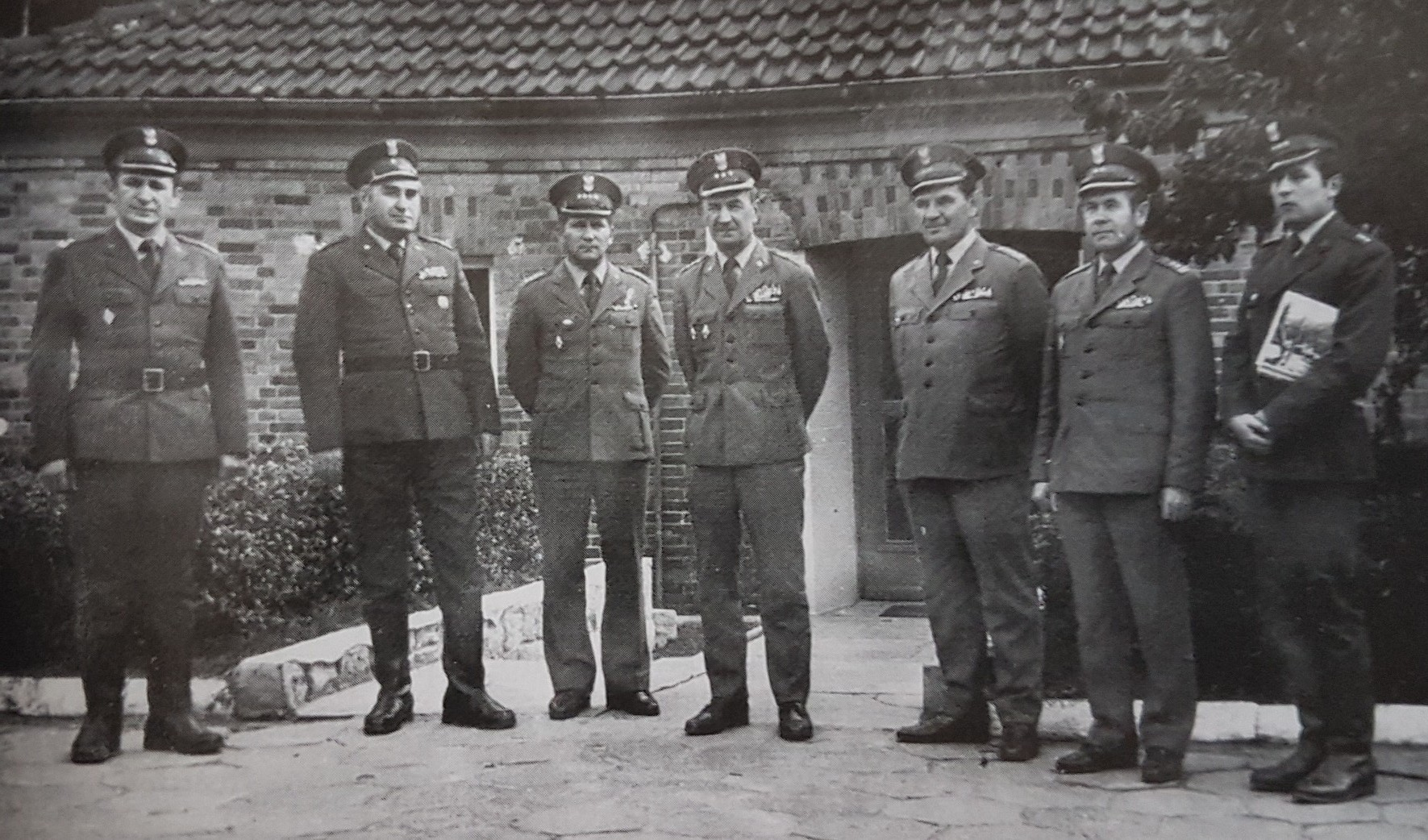 Garnizon Drawno. Dowódca ppłk Henryk Kędzierski